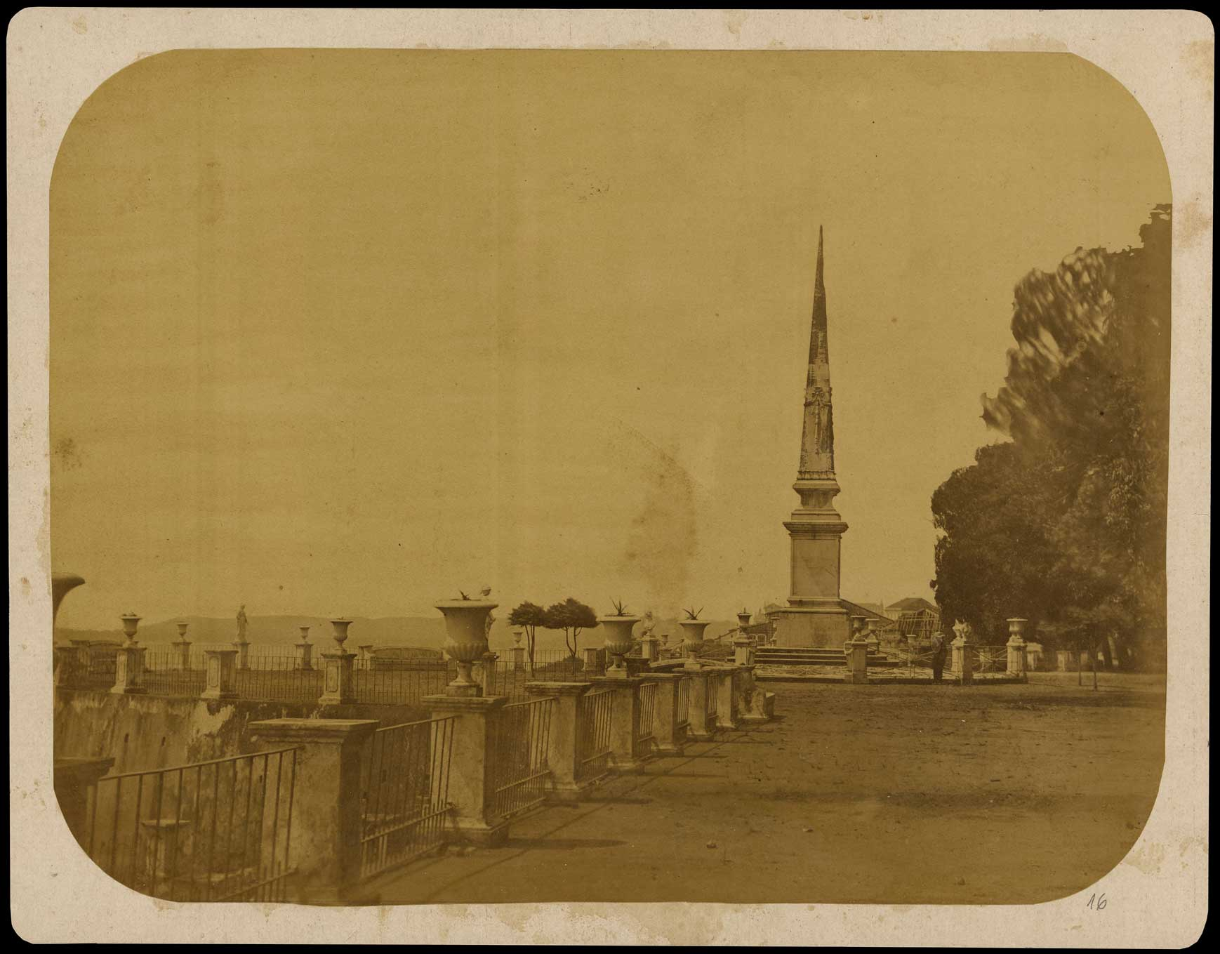 Autor/Criador Castro y Ordoñez, Rafael, 1834-1865 Título Passeio da Bahia [Iconográfico] Imprenta Salvador, BA : [s.n.], 1862. Descrição original 1 foto : papel albuminado, p&b ; 19,9 x 26 cm.